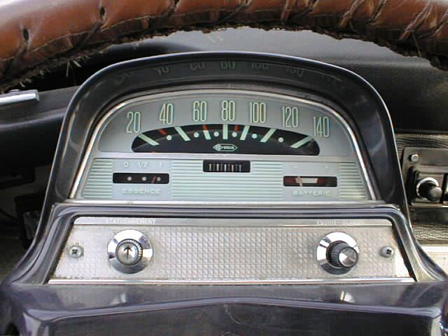 Intérieur d'une AMI6 (1968)